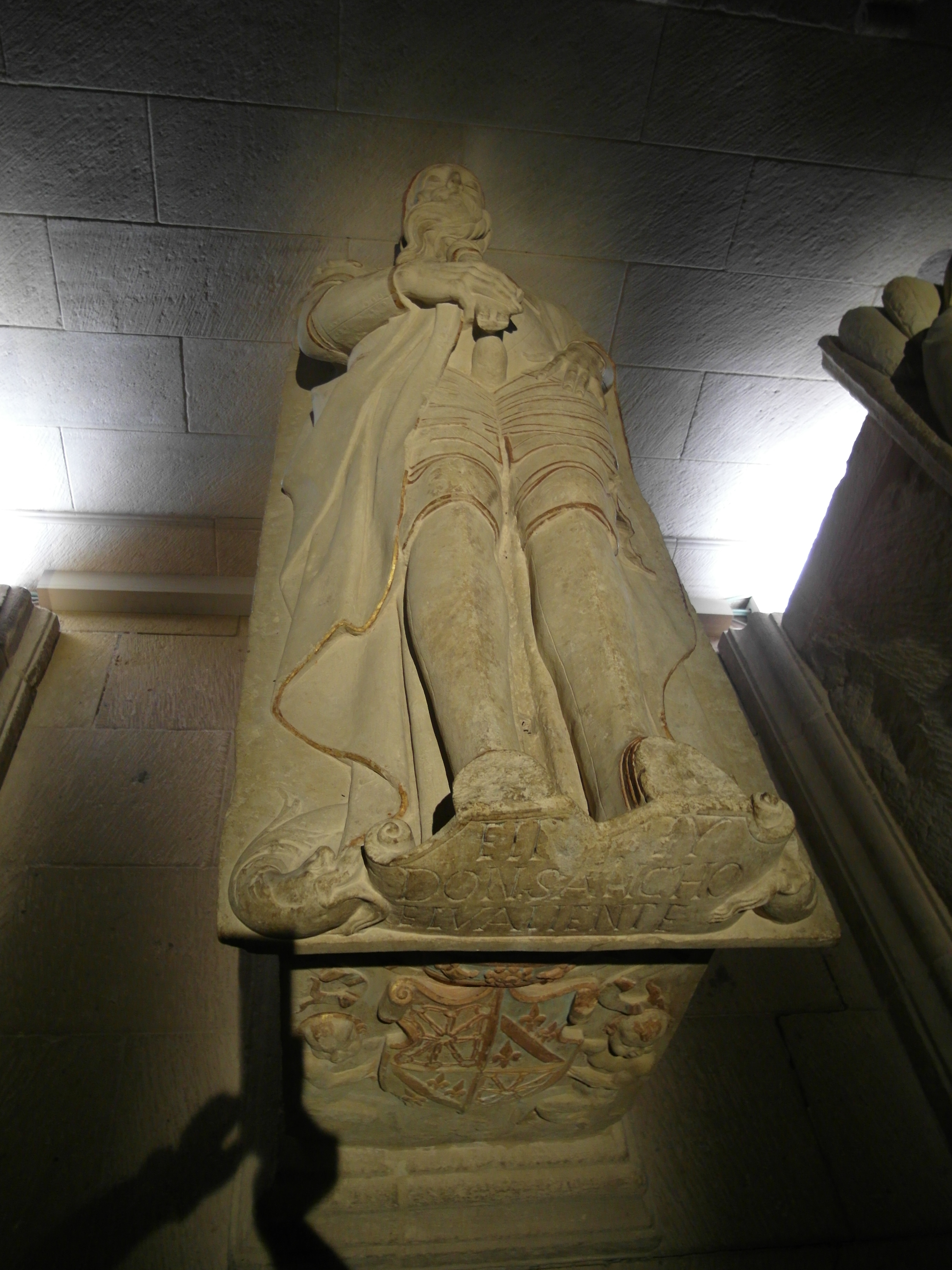 Santa María la Real, Nájera, La Rioja.